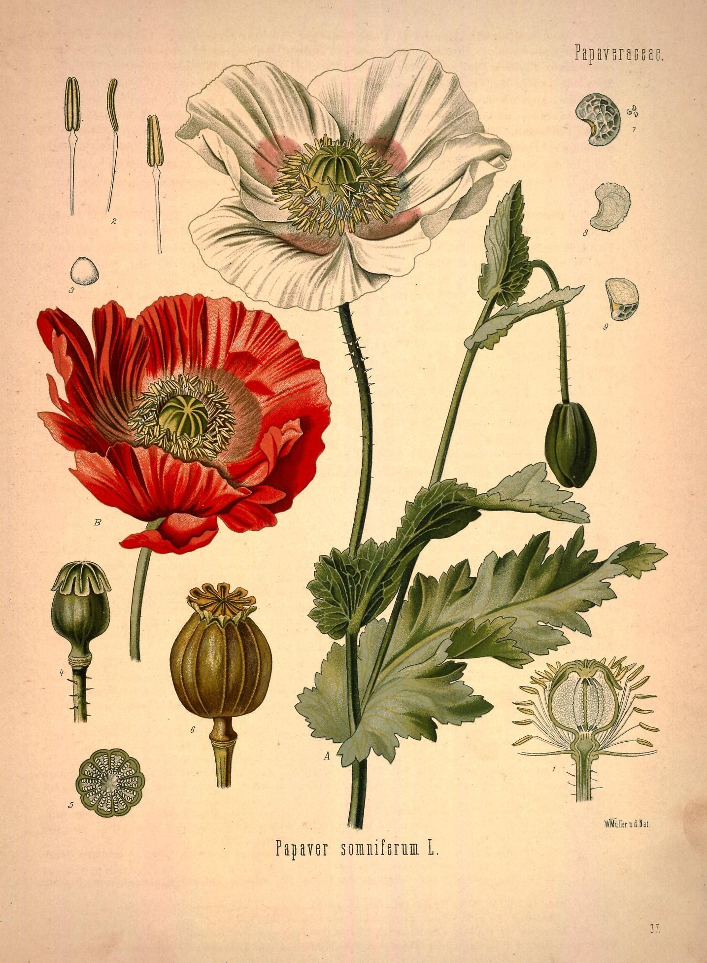 Schlafmohn. A Pflanze der weissen Unterart in natürl. Grösse; B Blüthe der rothen Unterart, desgl.; 1 Stempel mit Staubgefässen, desgl.; 2 Staübgefässe, von verschiedenen Seiten, vergrössert; 3 Pollen, unter Wasser gesehen, desgl.; 4 Stempel, natürl. Grösse; 5 derselbe im Querschnitt, desgl.; 6 reife Fruchtkapsel, desgl.; 7 Same, natürl. Grösse und vergrössert; 8 derselbe im Längsschnitt, vergrössert; 9 derselbe im Querschnitt, desgl.